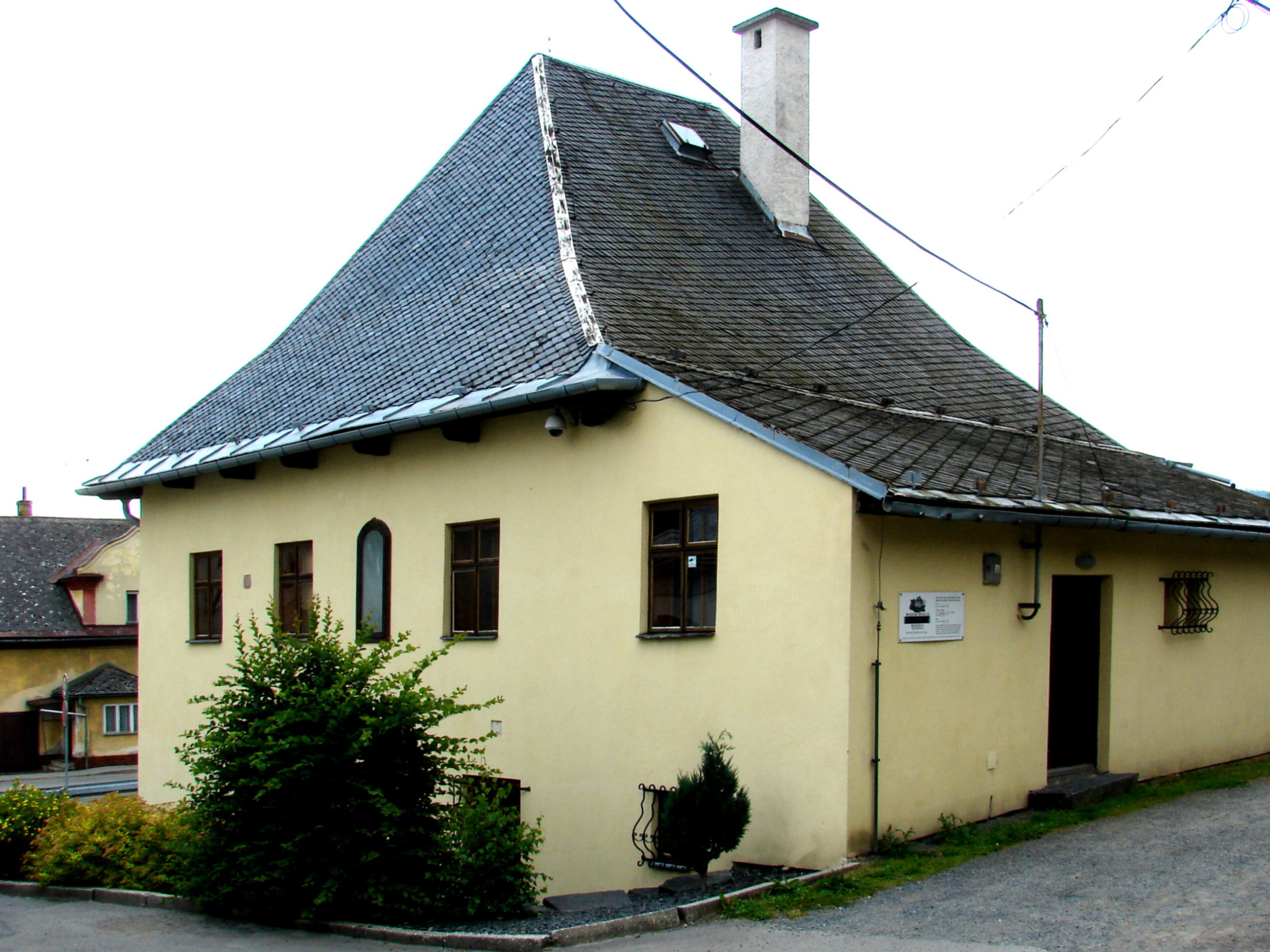 Muzeum břidlice v Budišově nad Budišovkou